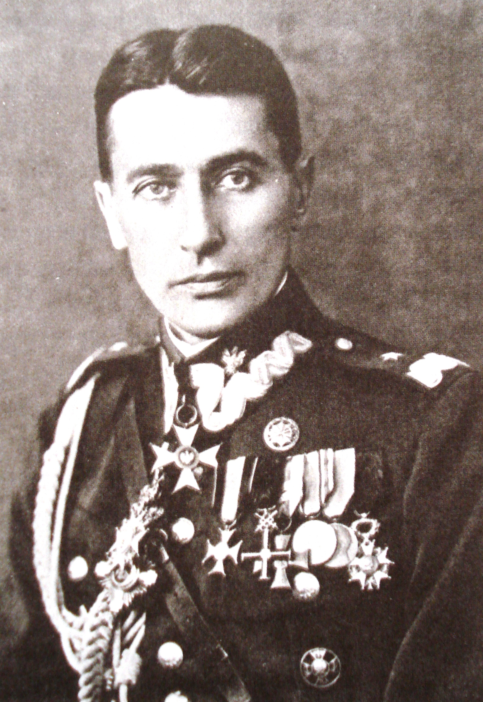 gen. bryg. Julian Stachiewicz